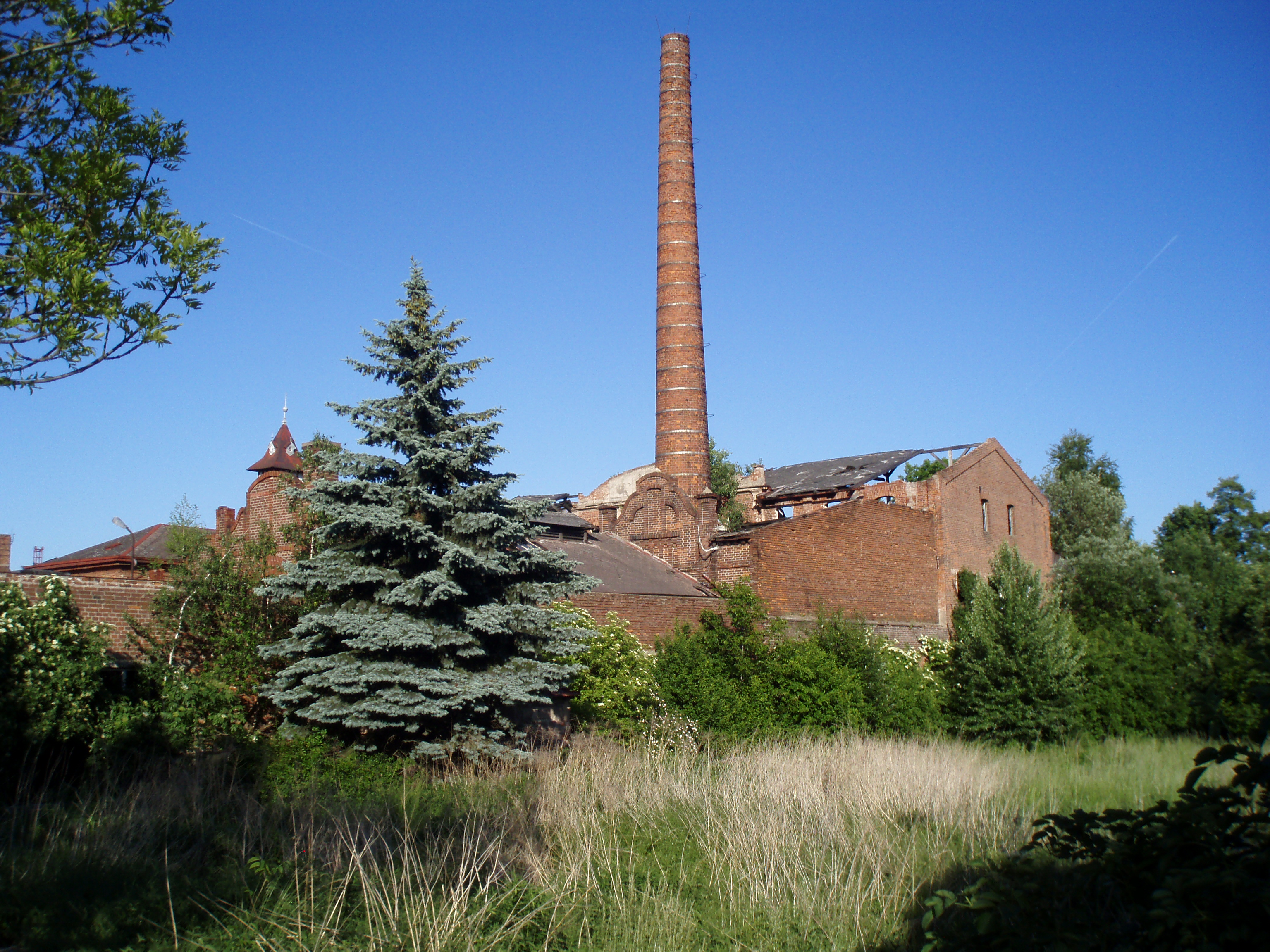 Kuklenská koželužna